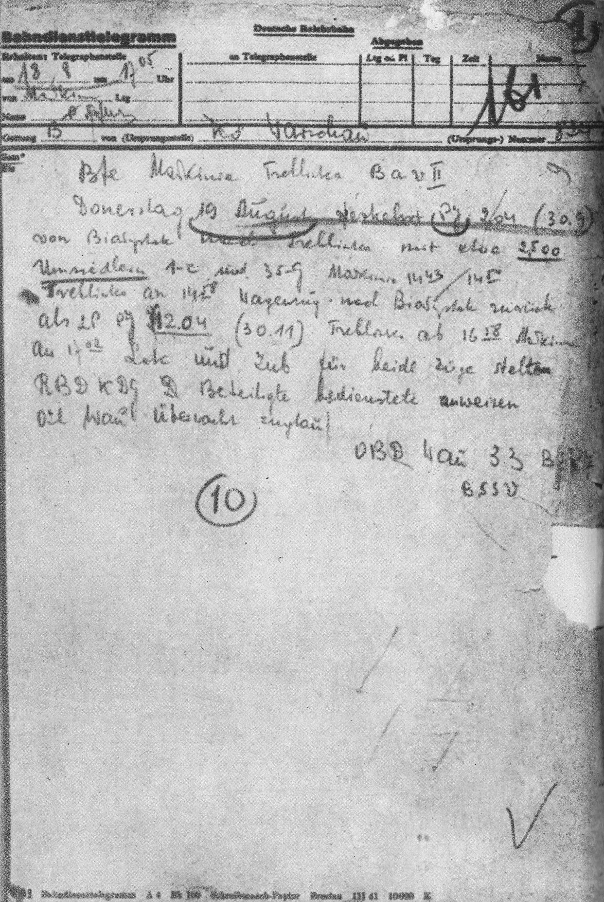 Telegram z dnia 18 sierpnia 1943 nadany z Generalnej Dyrekcji Kolei Wschodniej (Generaldirektion der Ostbahn, Gedob) o uruchomieniu pociągu w dniu 19 sierpnia 1943 (symb. Pj 204) z Żydami z Białegostoku do Treblinki w składzie 35 wagonów towarowych. Był to ostatni pociąg przyjęty przez obóz przed jego likwidacją